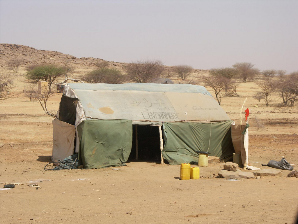 Gendarmerie